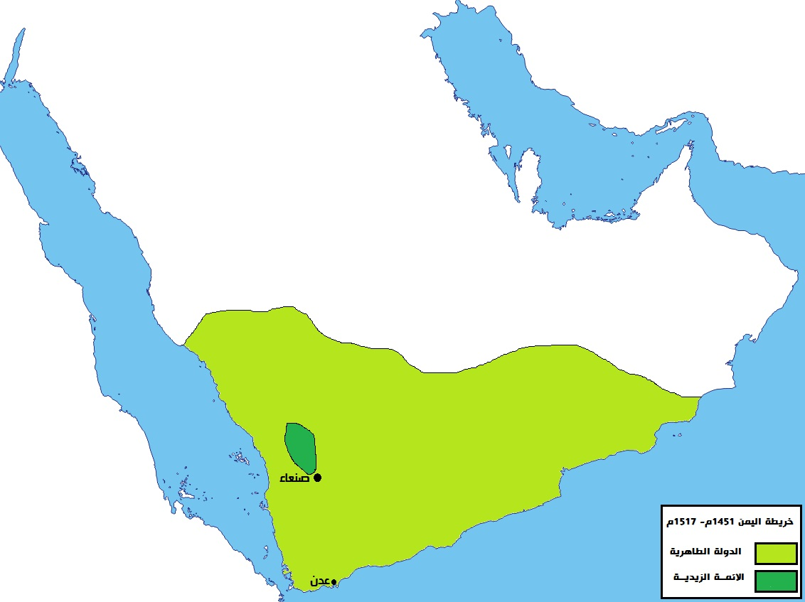 خريطة الدولة الطاهرية (اليمن)